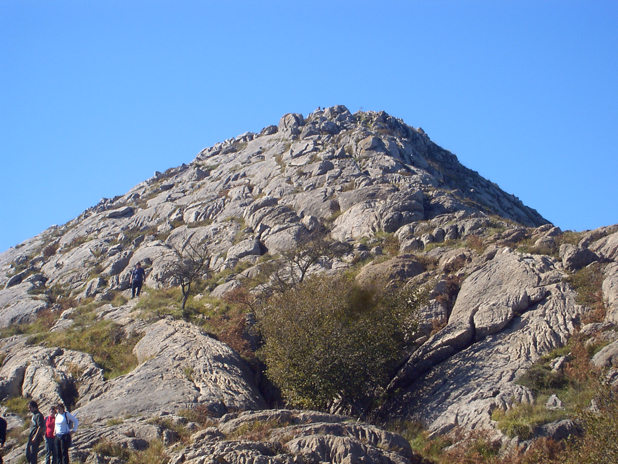 Kurutzaga edo Pico la cruz mendiaren gaina